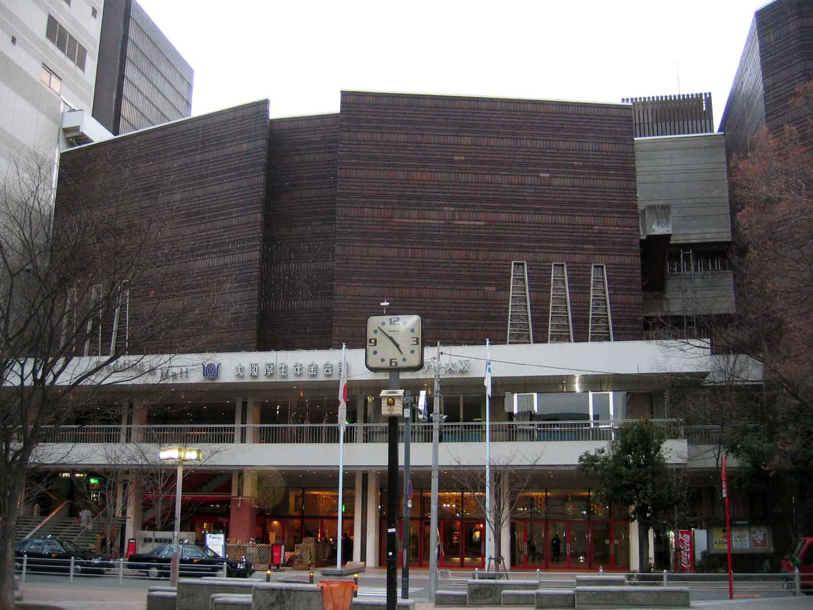 大阪厚生年金会館